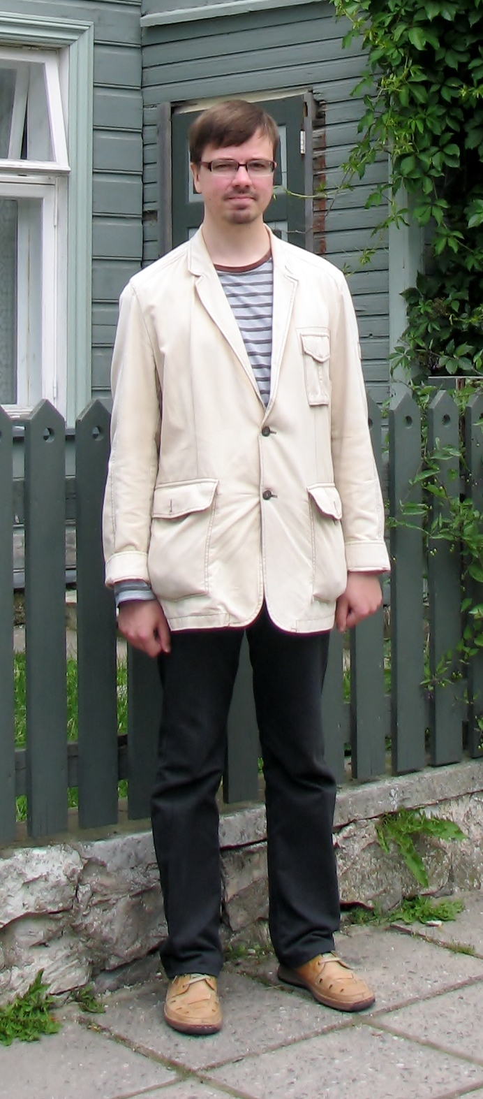 Eesti luuletaja Rolf Liiv